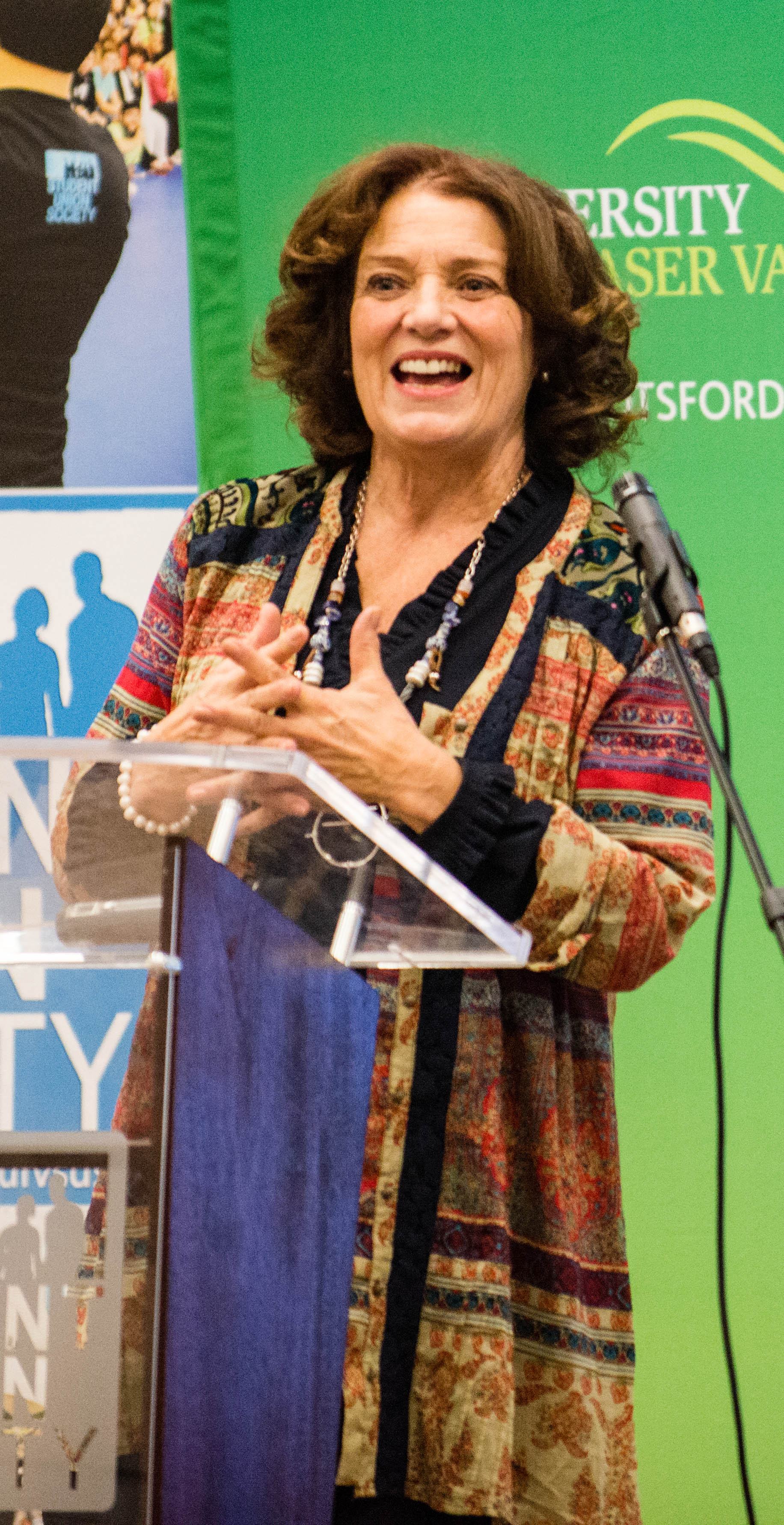 Margaret Trudeau at UFV 17